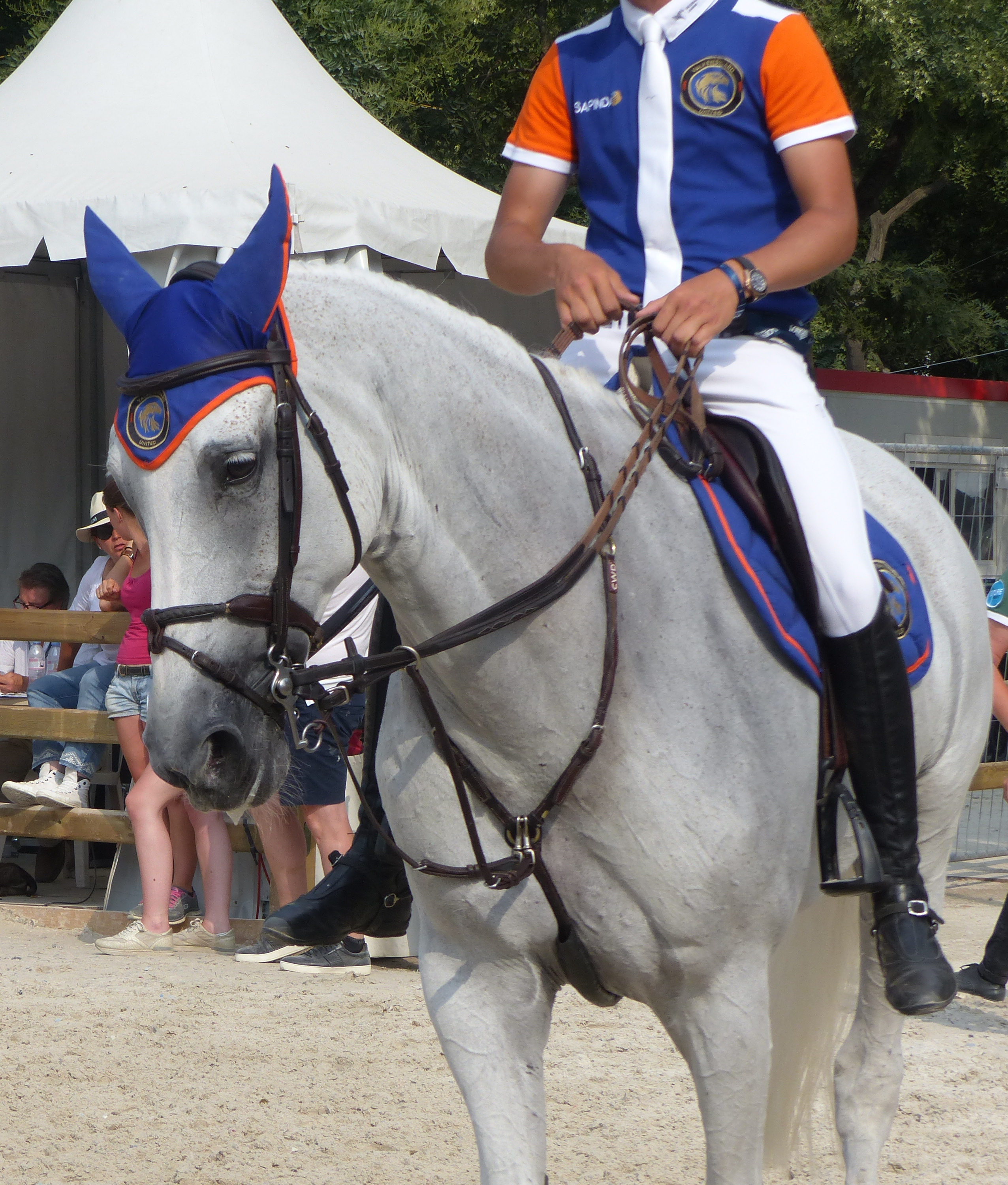 Bertram Allen et sa jument Molly Malone V lors du Paris Eiffel Jumping 2018.